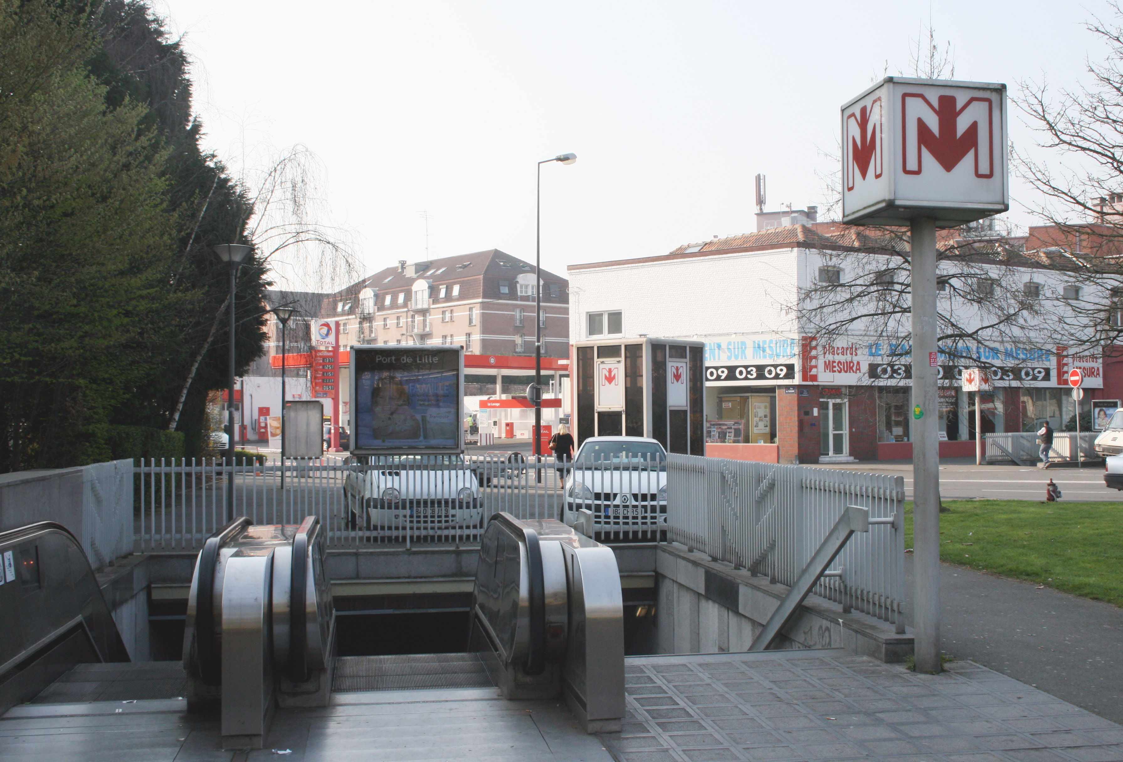 Station de metro Port de Lille